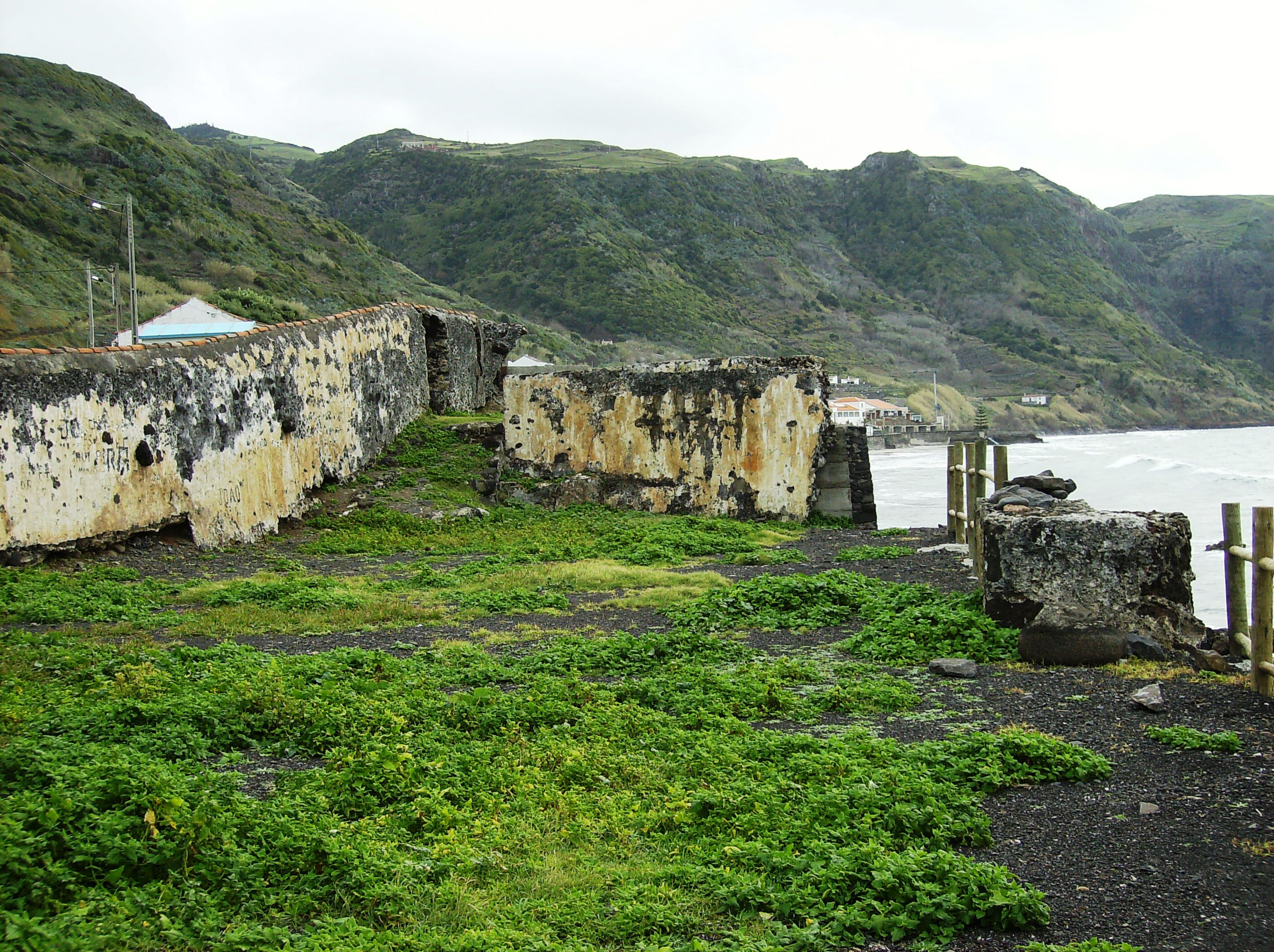 Forte de São João Baptista da Praia Formosa, Açores (Portugal) - internal view